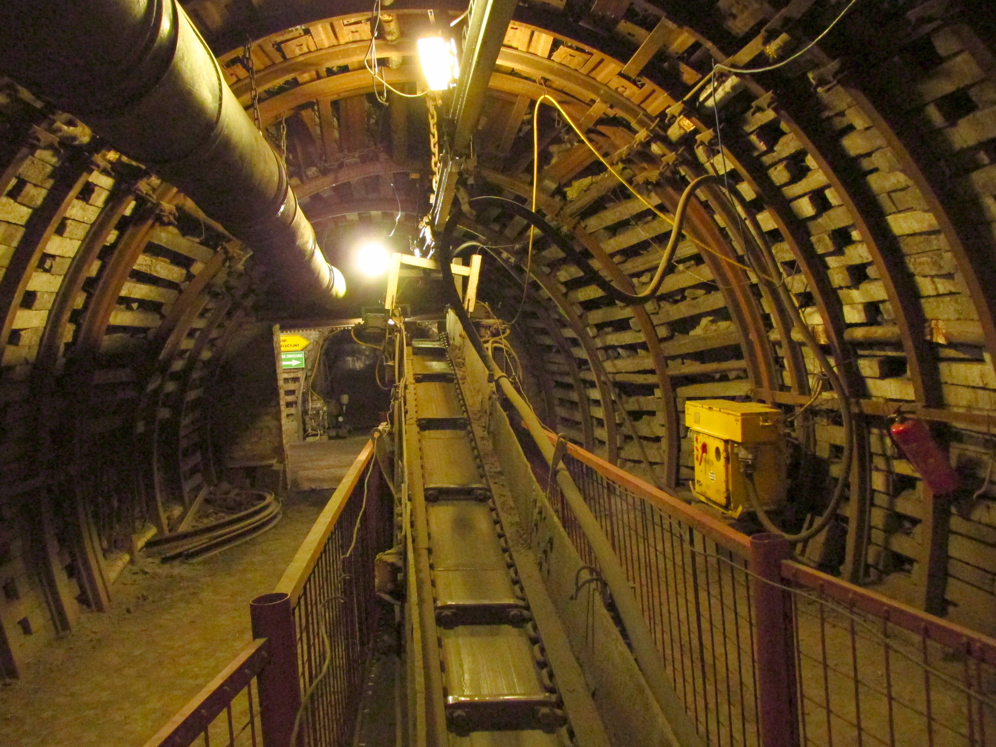 Przenośnik zgrzebłowy przy kombajnie Alpina AM-50 w kopalni Guido w Zabrzu